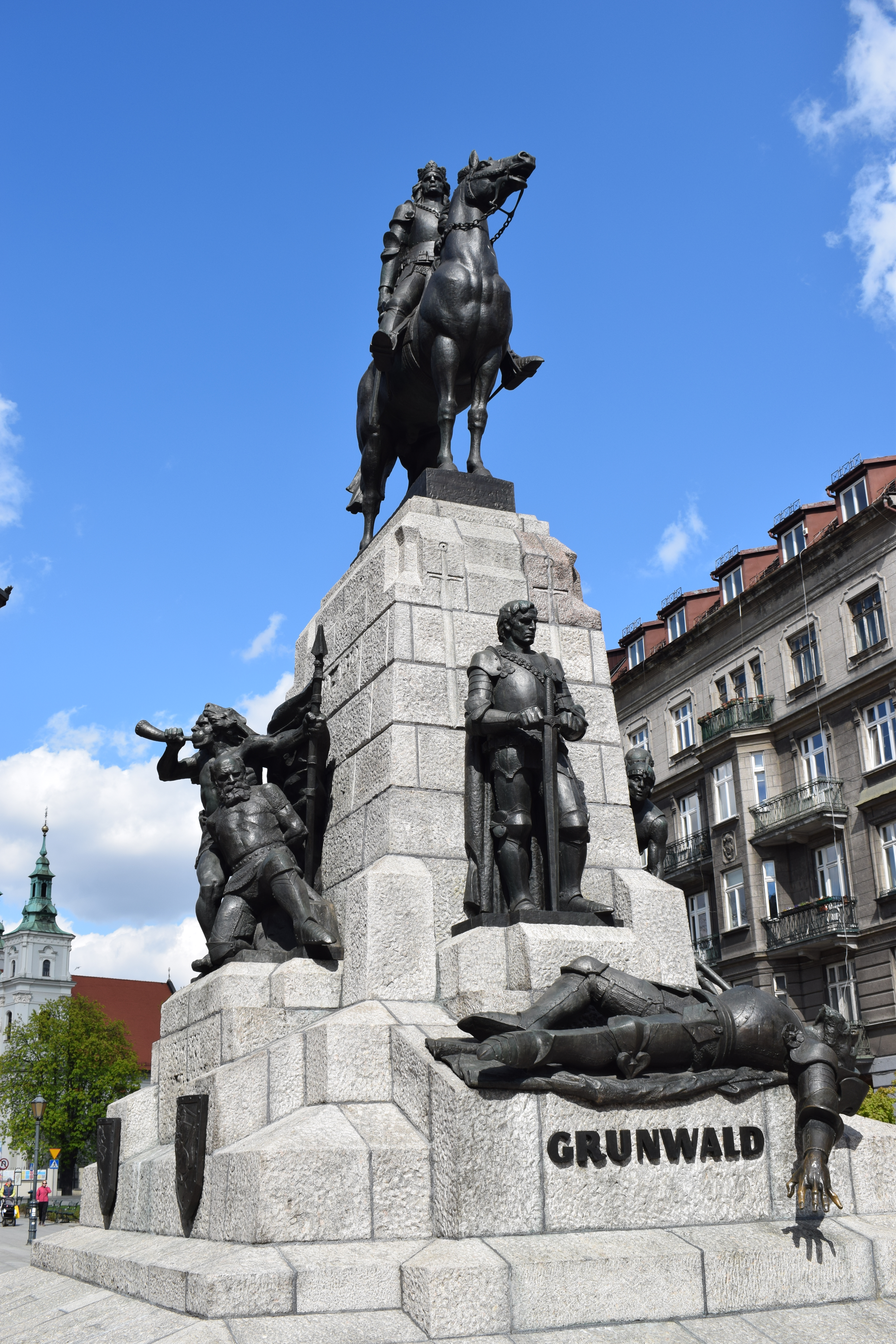 Pomnik Grunwaldzki w Krakowie